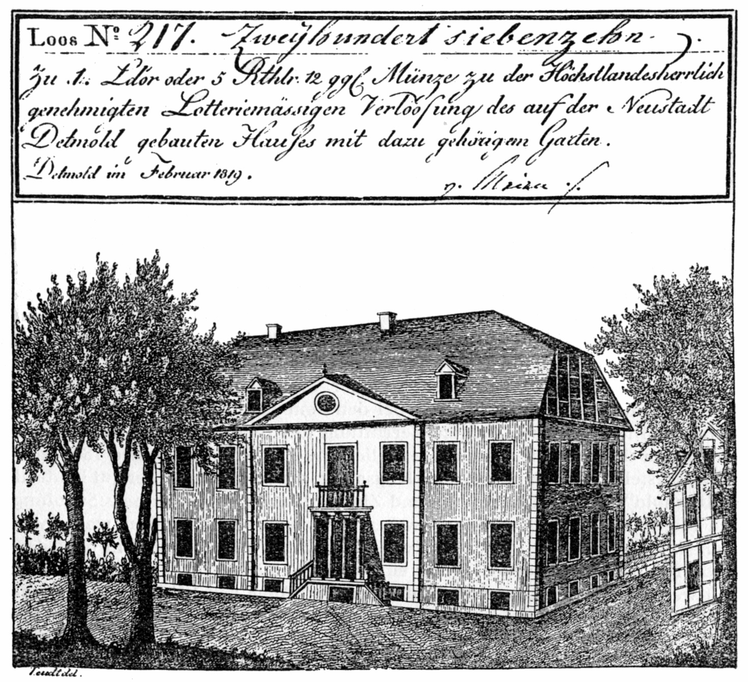 Los von 1819, Hauptgewinn: Das noch zu errichtende Haus Allee 1 in Detmold